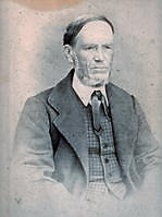 Retrato de Jose Antonio Gutiérrez Gutiérrez dibujado por Agustina Gutiérrez Salazar, pintora y dibujante. Nació en 1851 en San Fernando, Chile. Murió en Santiago en Septiembre de 1886. Considerada como la primera mujer que ingresó a la Academia de Pintura en Chile en 1866, cuando contaba con quince años. Fue alumna de Alejandro Ciccarelli y en 1869, fue nombrada profesora de dibujo por el Supremo Gobierno, siendo una de las iniciadoras de la disciplina como enseñanza Oficial.